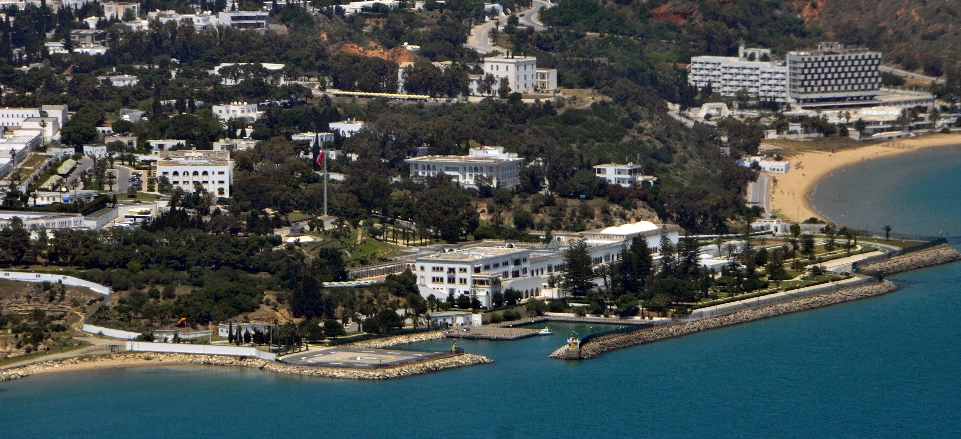 Vue aérienne du palais présientiel de Carthage